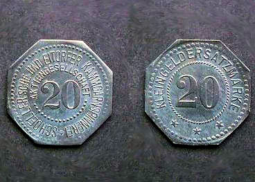 Kleingeldersatzmarke